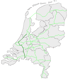 E19 in Nederland, zelf gemaakt